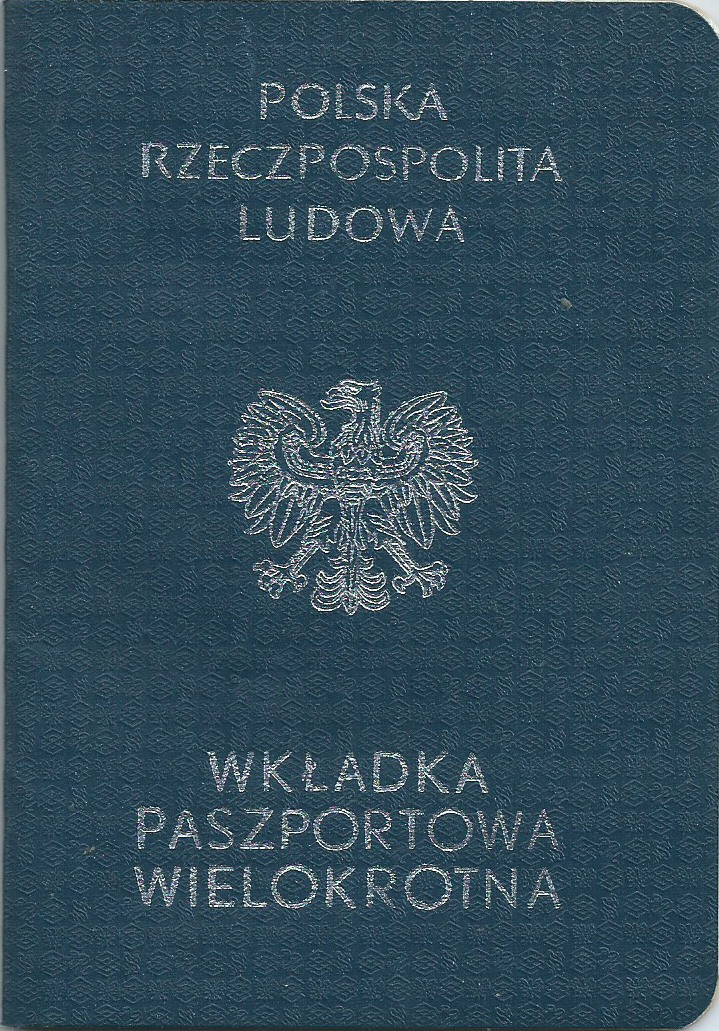 Wkładka Paszportowa do Dowodu Osobistego o konkretnym numerze, uprawniająca do wielokrotnego przekraczania granicy. Ważna na kraje: Ludowa Republika Bułgarii, Czechosłowacka Republika Socjalistyczna, Niemiecka Republika Demokratyczna, Węgierska Republika Ludowa i Związek Socjalistycznych Republik Radzieckich. Ważna na 5 lat. Nie zawierała zdjęcia. Do wkładki można było wpisać dzieci.